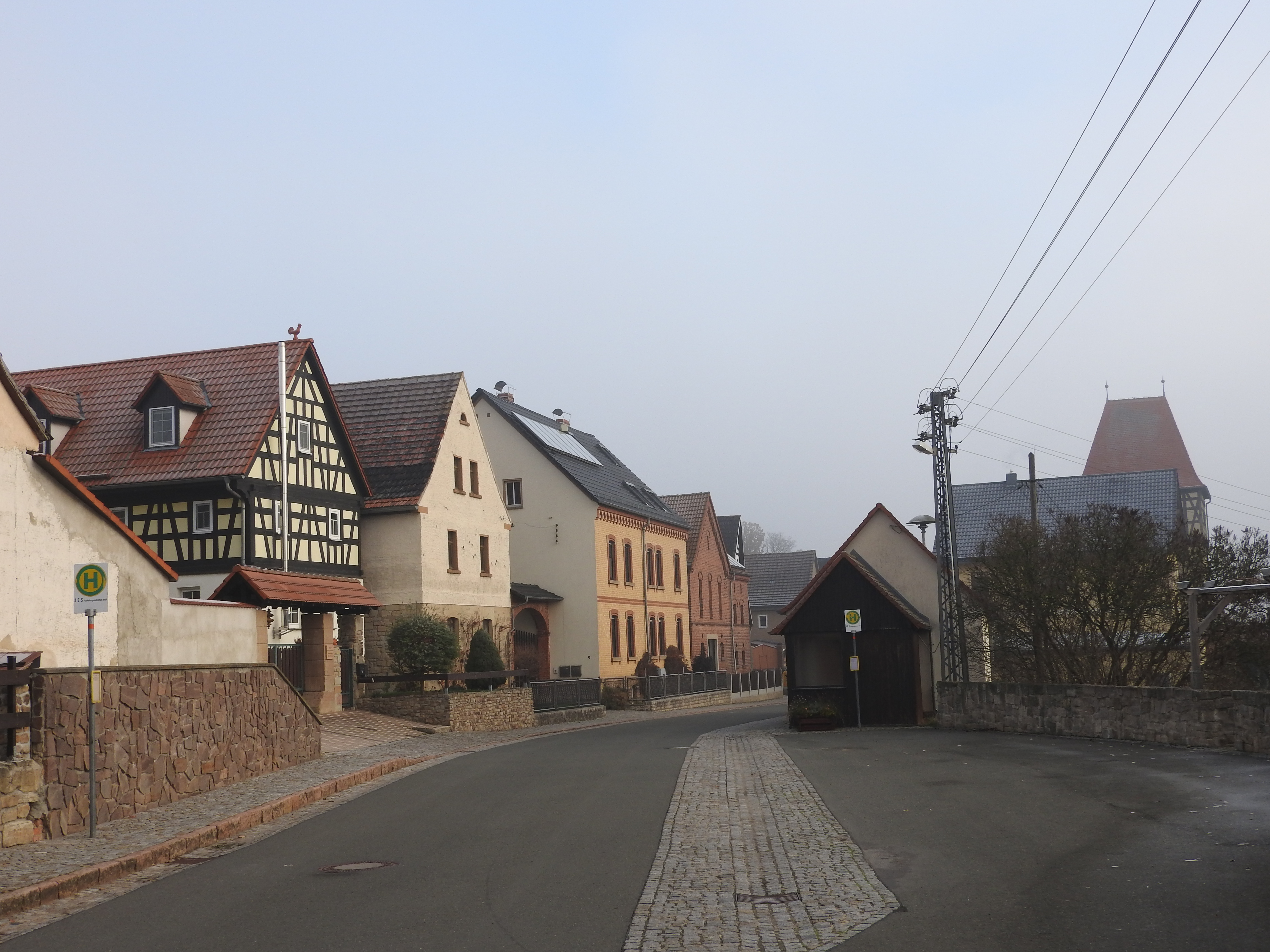 Hauptstraße in Walpernhain, Thüringen